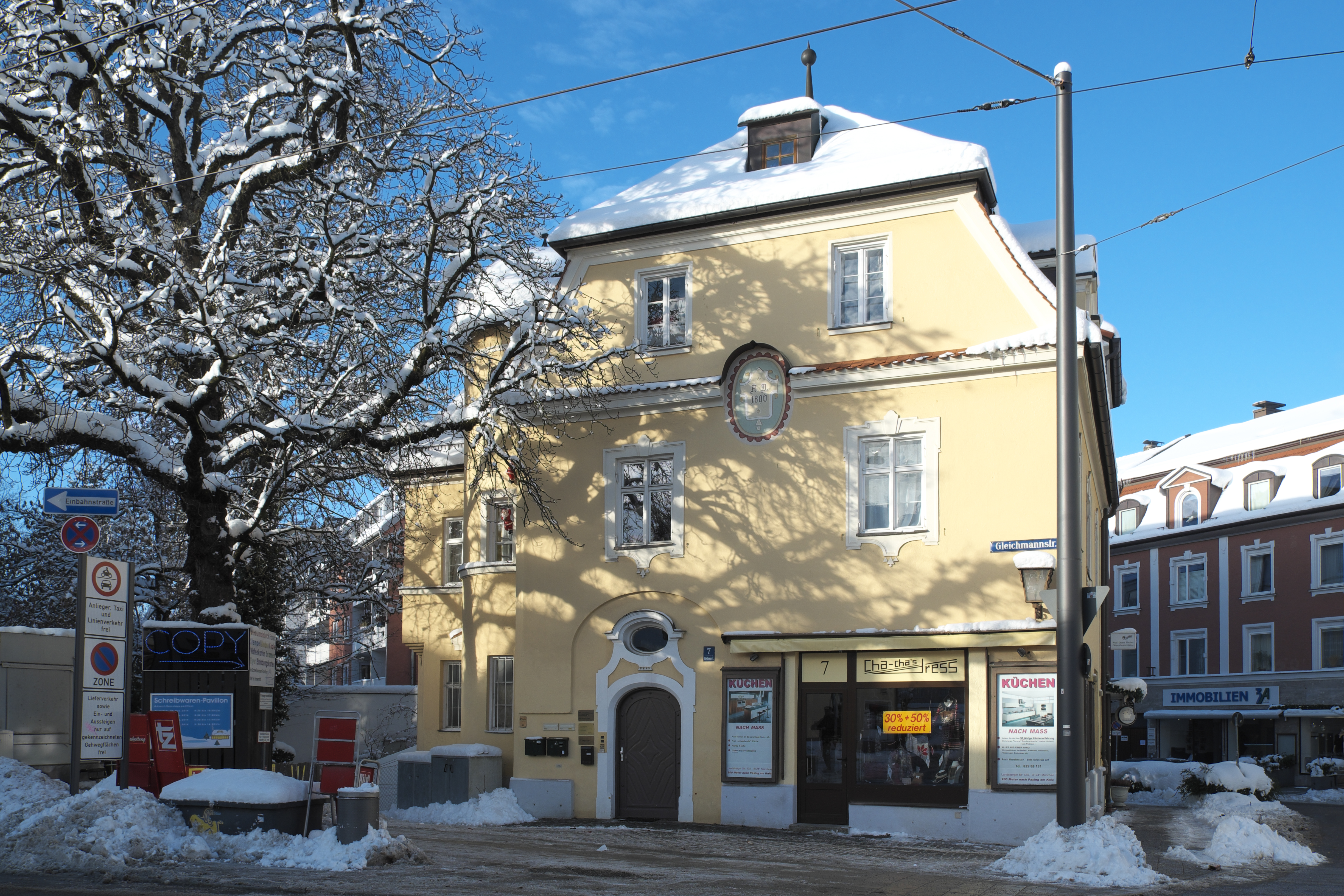 Wohn- und Geschäftshaus in der Gleichmannstraße 7 in Pasing im Stadtbezirk Pasing-Obermenzing in München (Bayern/Deutschland), von 1896